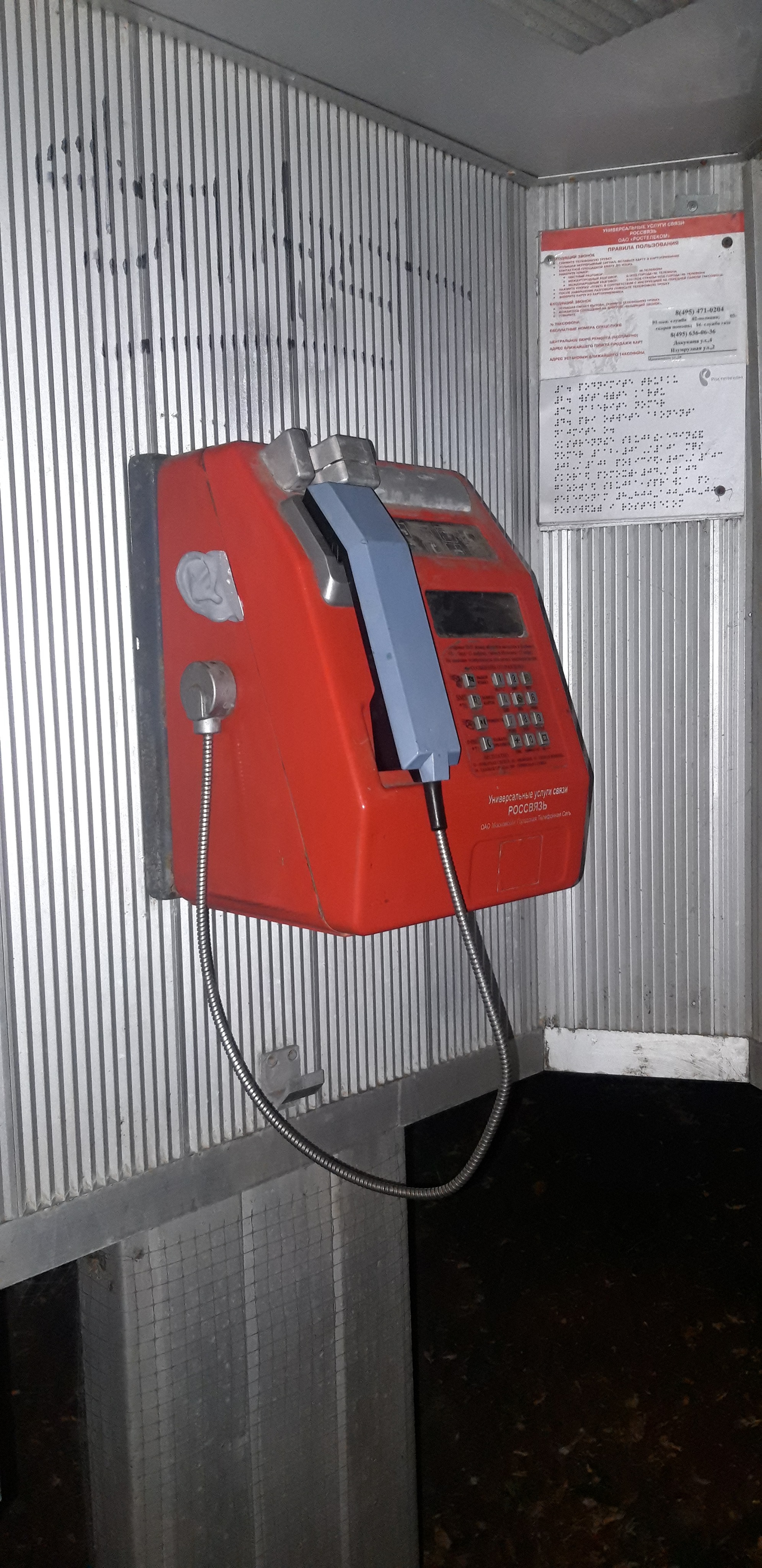 Маяна Ринатовна Насыбуллова. Стрит-арт проект "Родина Слушает", 2019